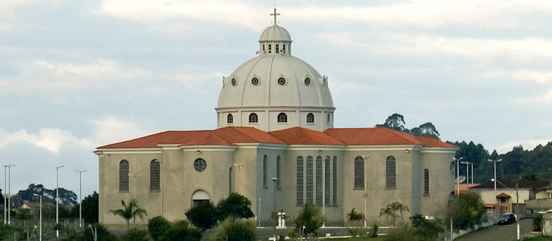 Basílica de São José Operário - Barbacena, Minas Gerais